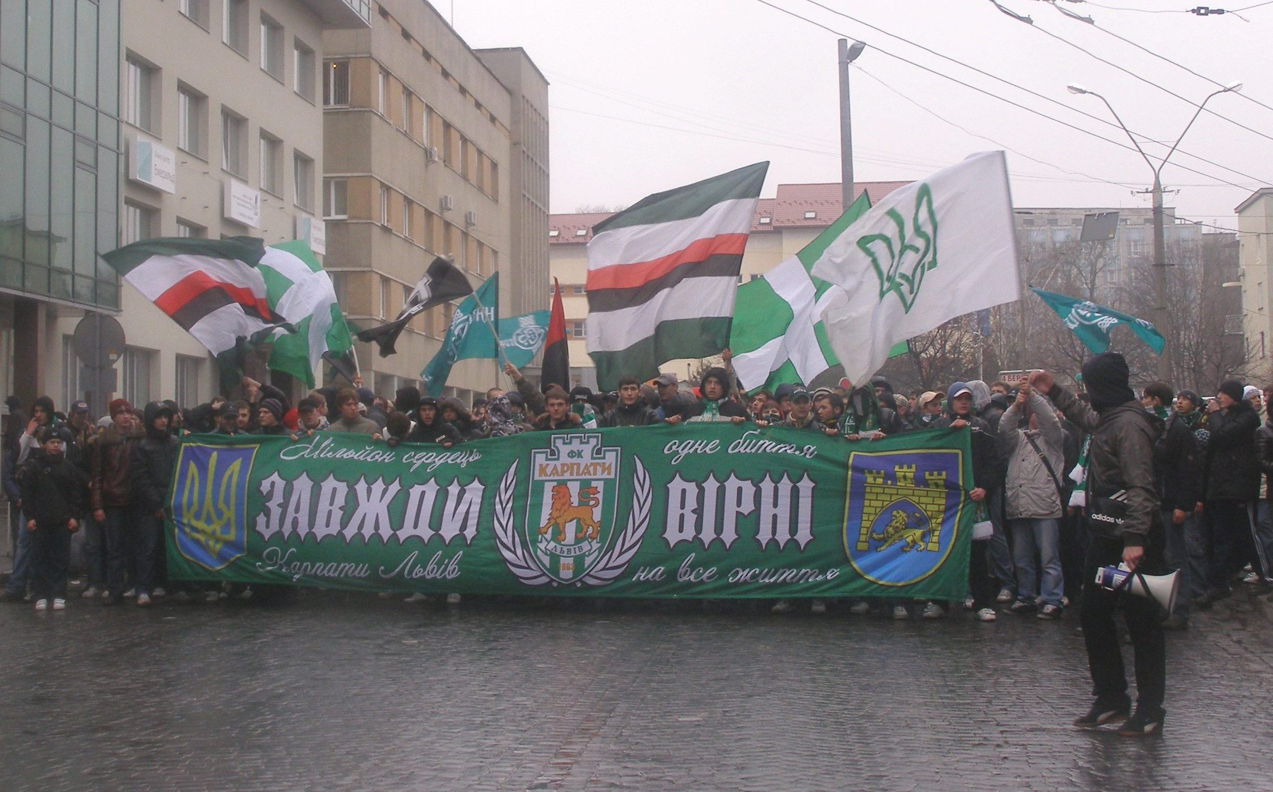 Fans von Karpaty Lwiw marschieren vor dem Spiel gegen Metalist